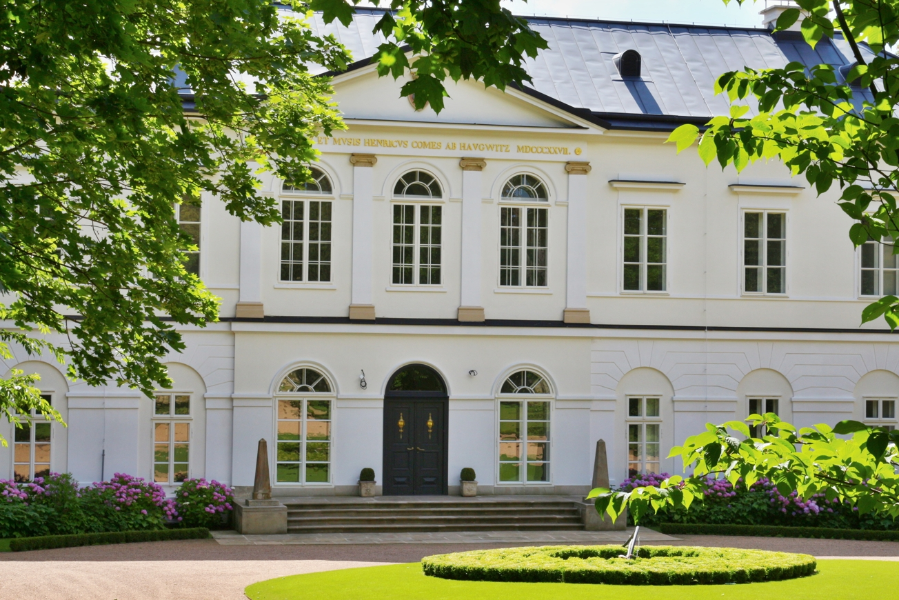 Zámek Šénvald, Jinošov